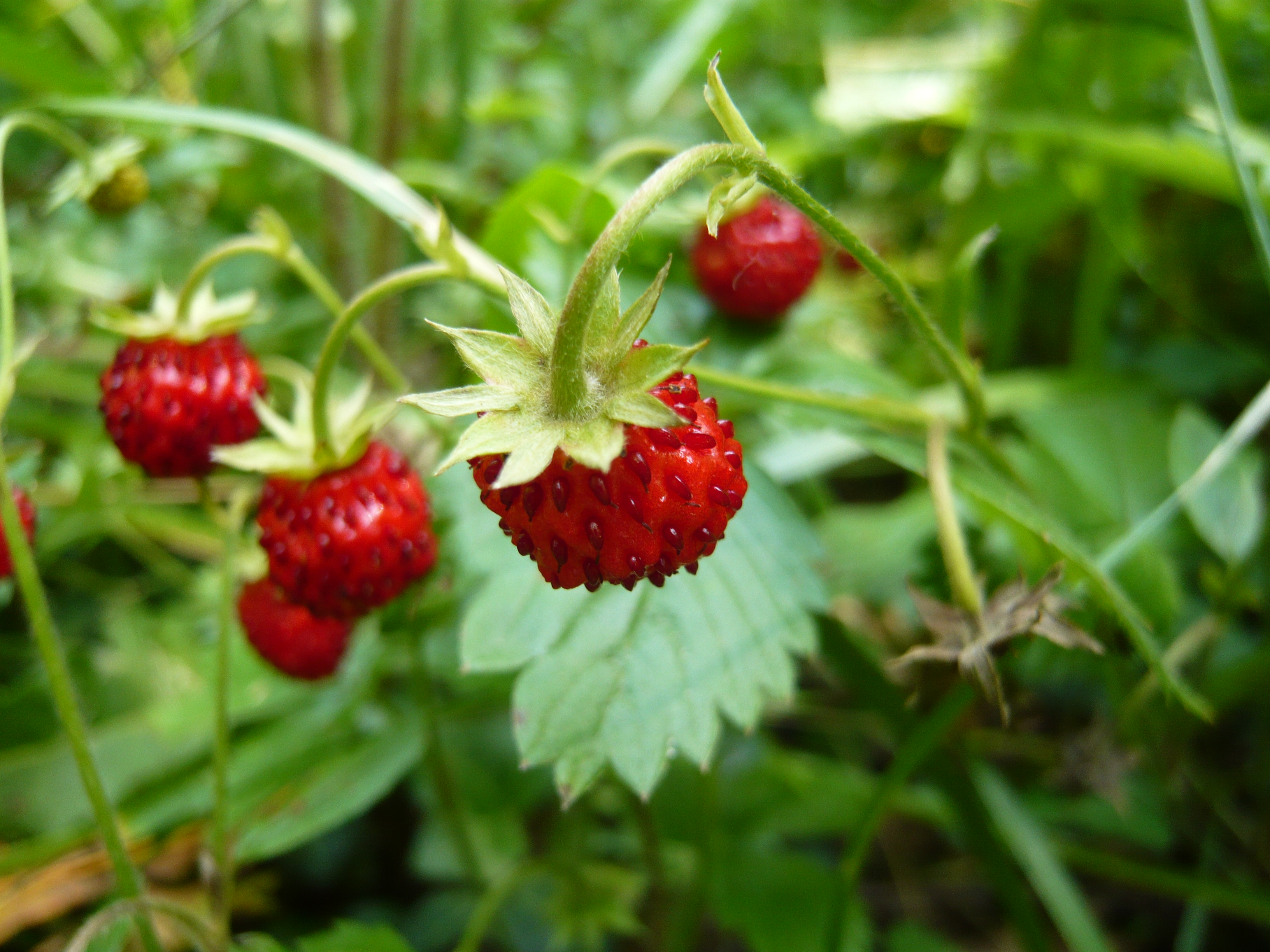 Fraise des bois, très gros plan - Sud-Ouest France.